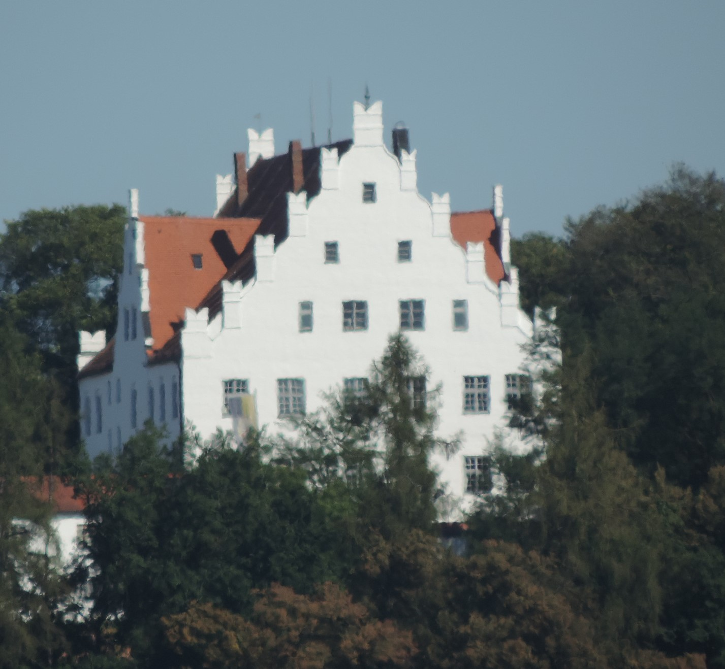 Schloss Neuburg im Kammeltal